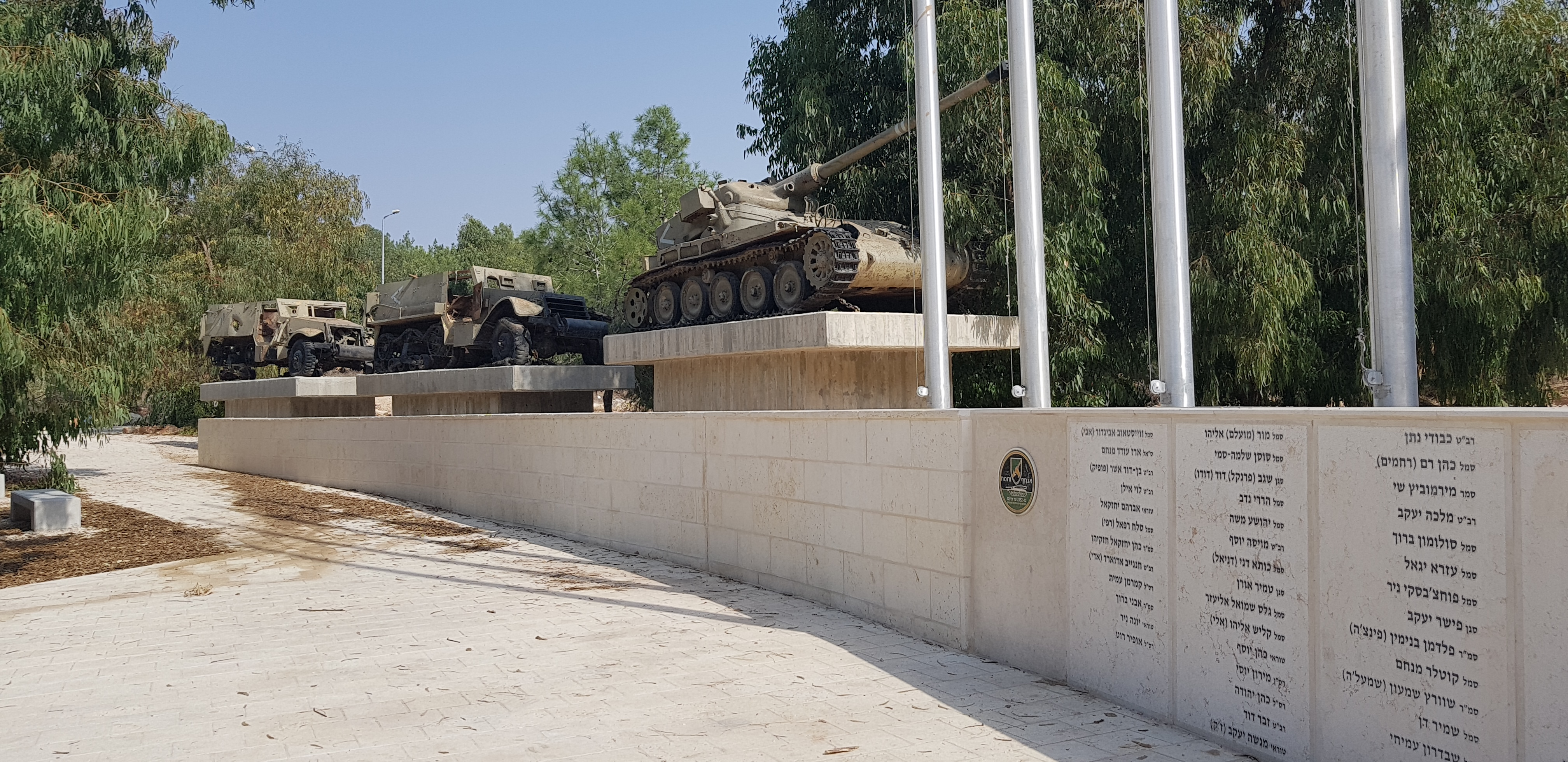 אנדרטת חטיבה 27 של עוצבת אגרף ורומח